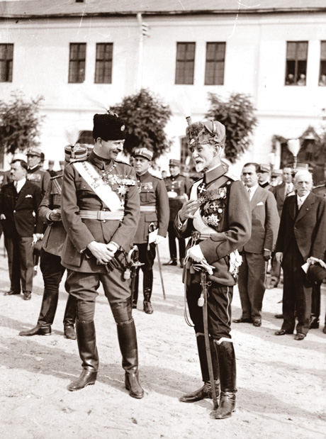 Regele Carol al II-lea şi Mareşalul Alexandru Averescu, în august 1930, la o festivitate de la Regimentul de Gardă